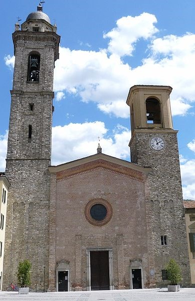 Bobbio - Cattedrale